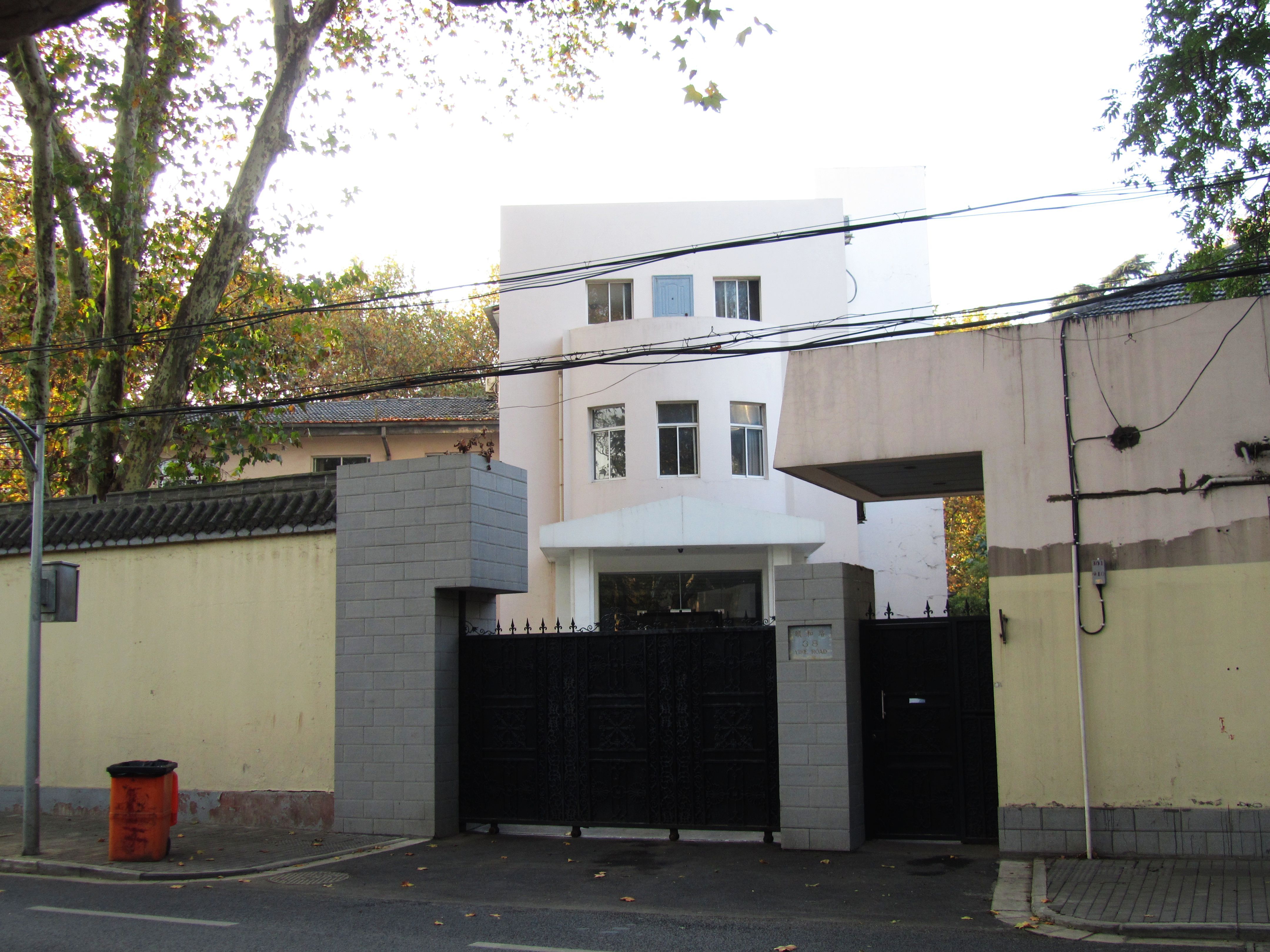 南京颐和路公馆区—汪精卫公馆旧址。